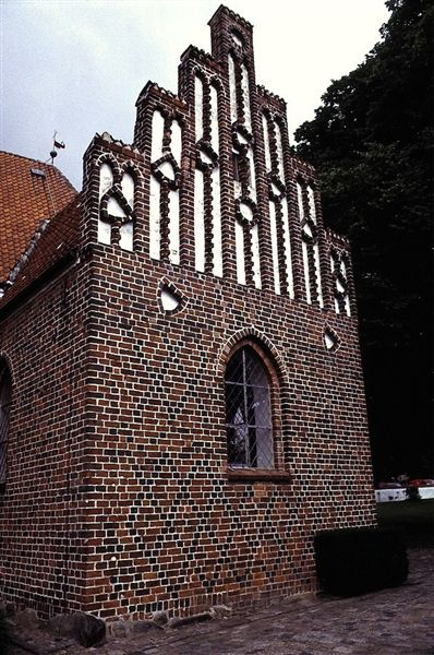 Vordingborg Vor Frue Kirke i Danmark. Sakristiet set fra syd